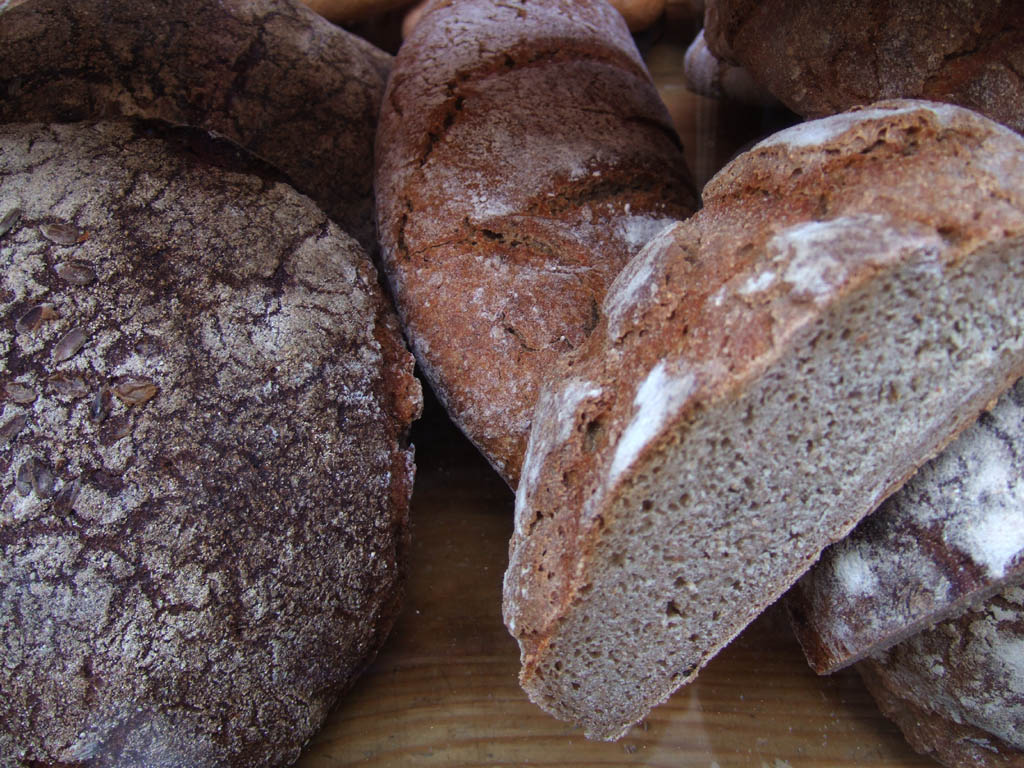 Volkornbrote